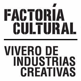 Logo de Factoría Cultural, vivero de industrias creativas